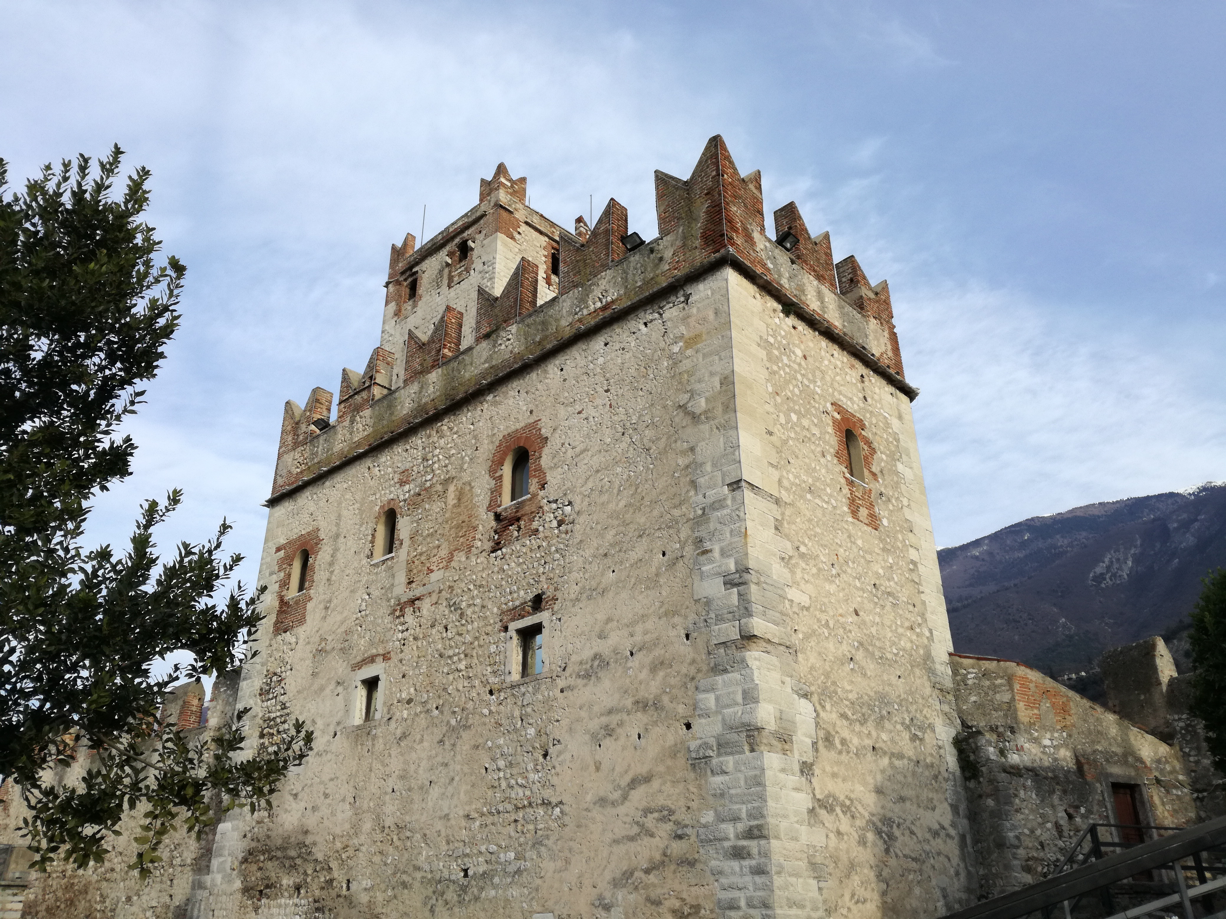 Der Palazzo Scaligero in der Scaligerburg Malcesine